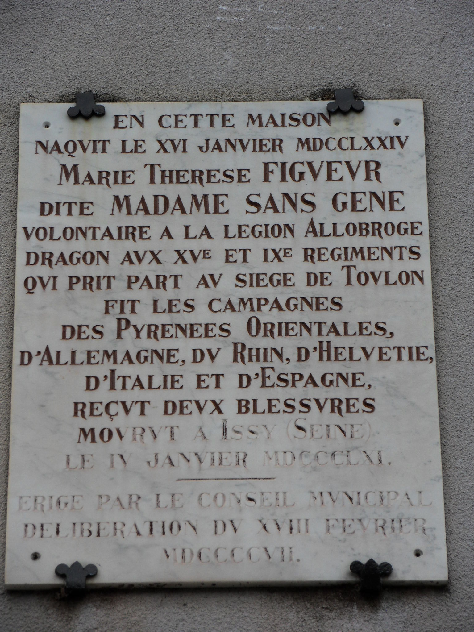 Talmay. Plaque commémorative de la naissance à Talmay (Côte-d'Or) de Thérèse Figueur, appelée aussi Madame Sans-Gêne